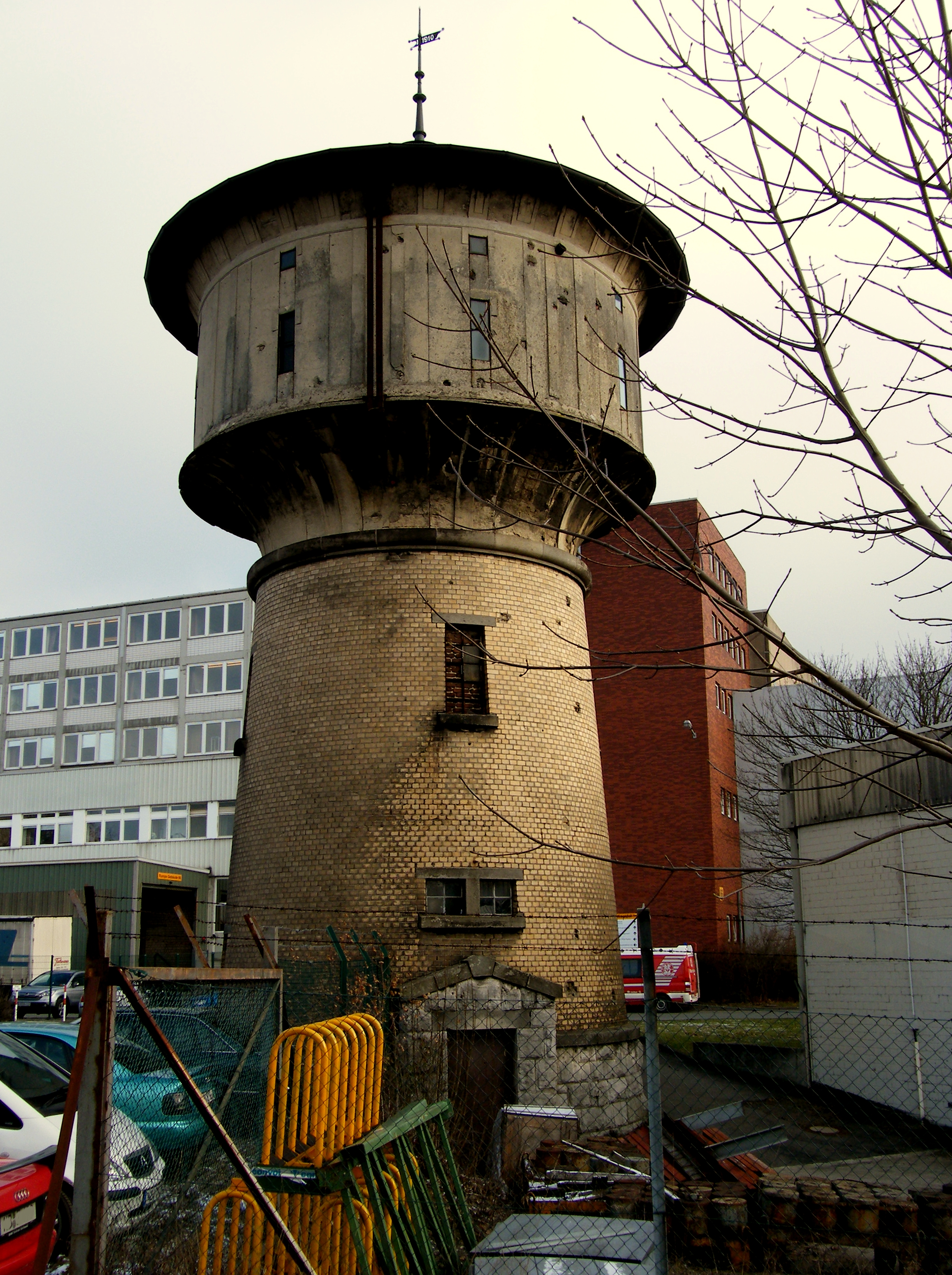 Bahnhofsgelände Bahnhof Korbach, ehemaliger Wasserturm aus dem Jahr 1910.